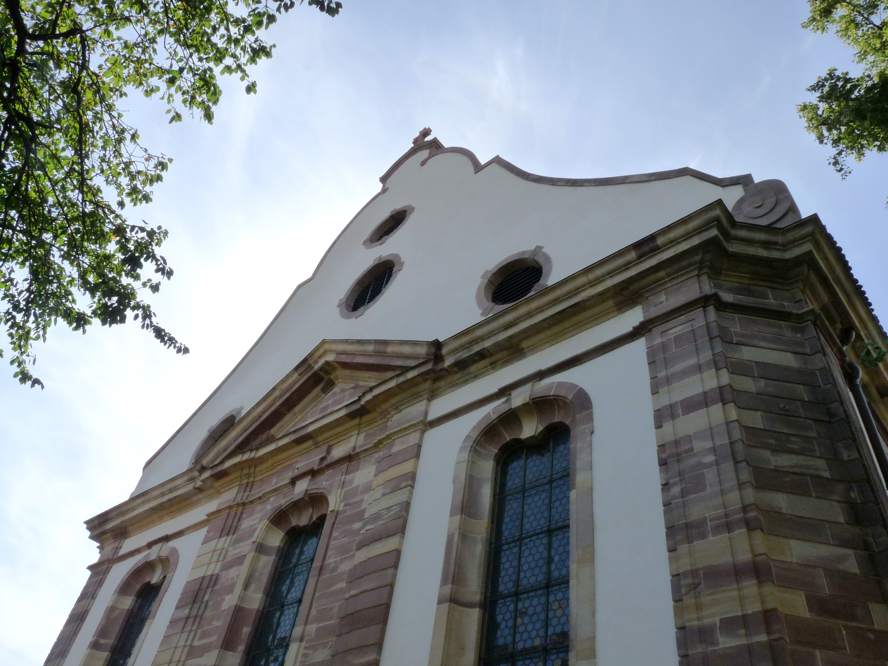 Pignon de l'église Sainte-Aurélie de Strasbourg. Pignon curviligne percé de quatre oculi, sur lequel empiète un fronton triangulaire.)